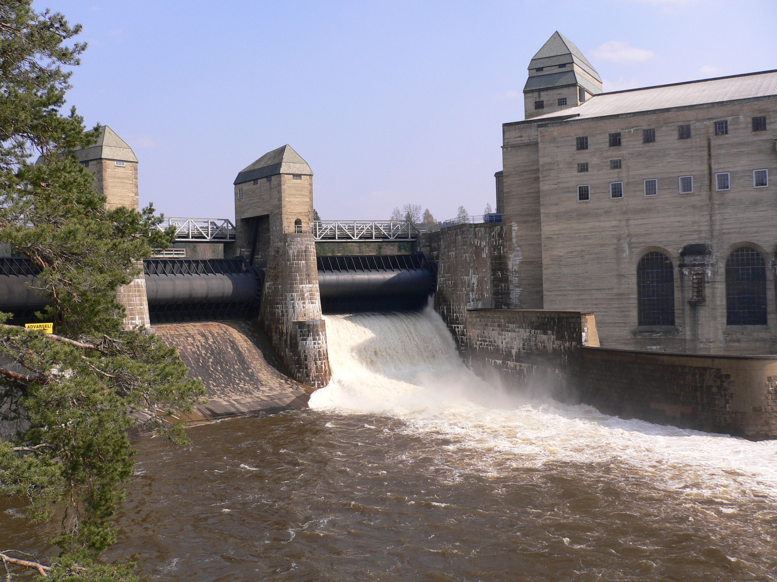 Solbergfoss